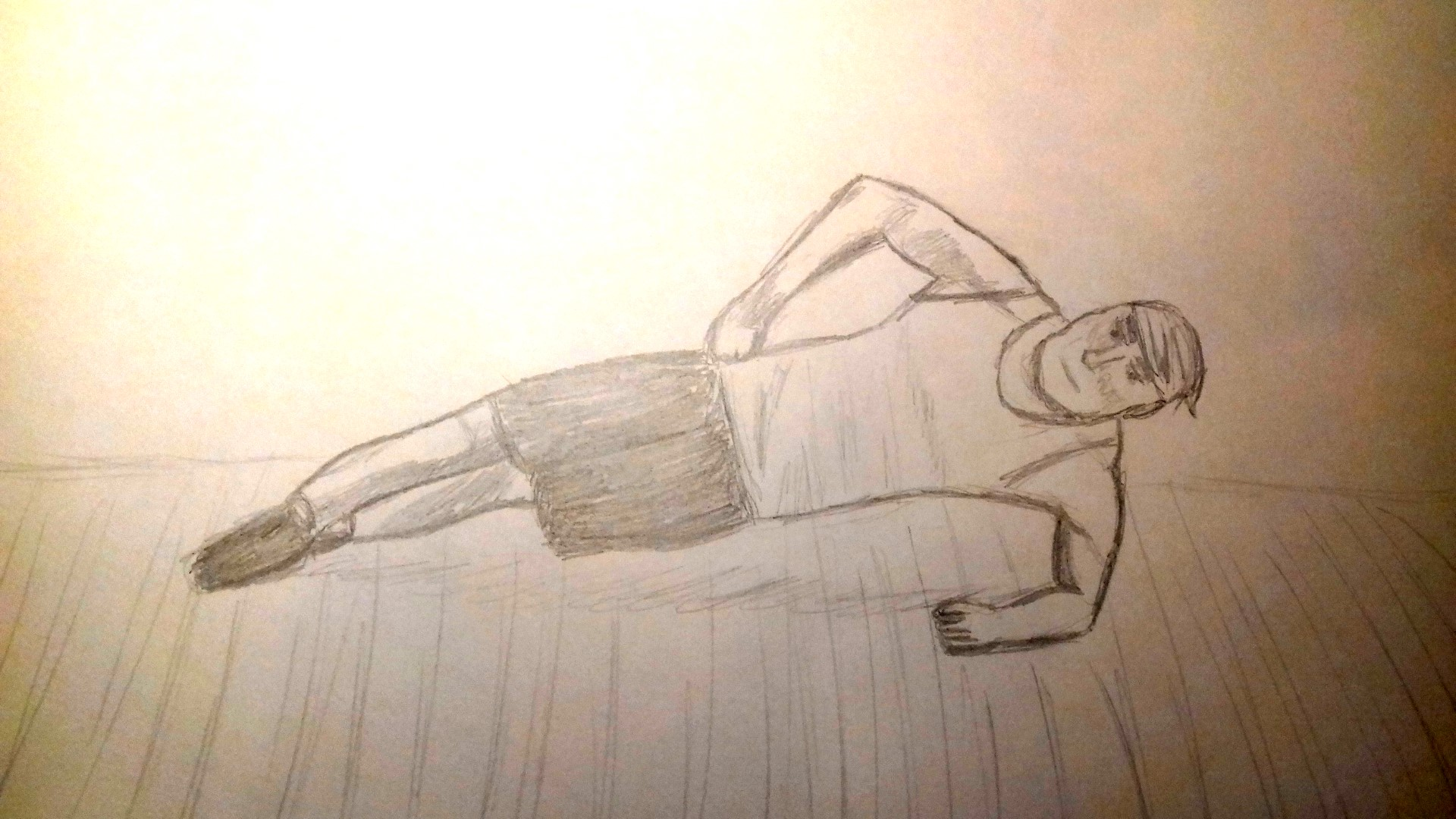 poutre